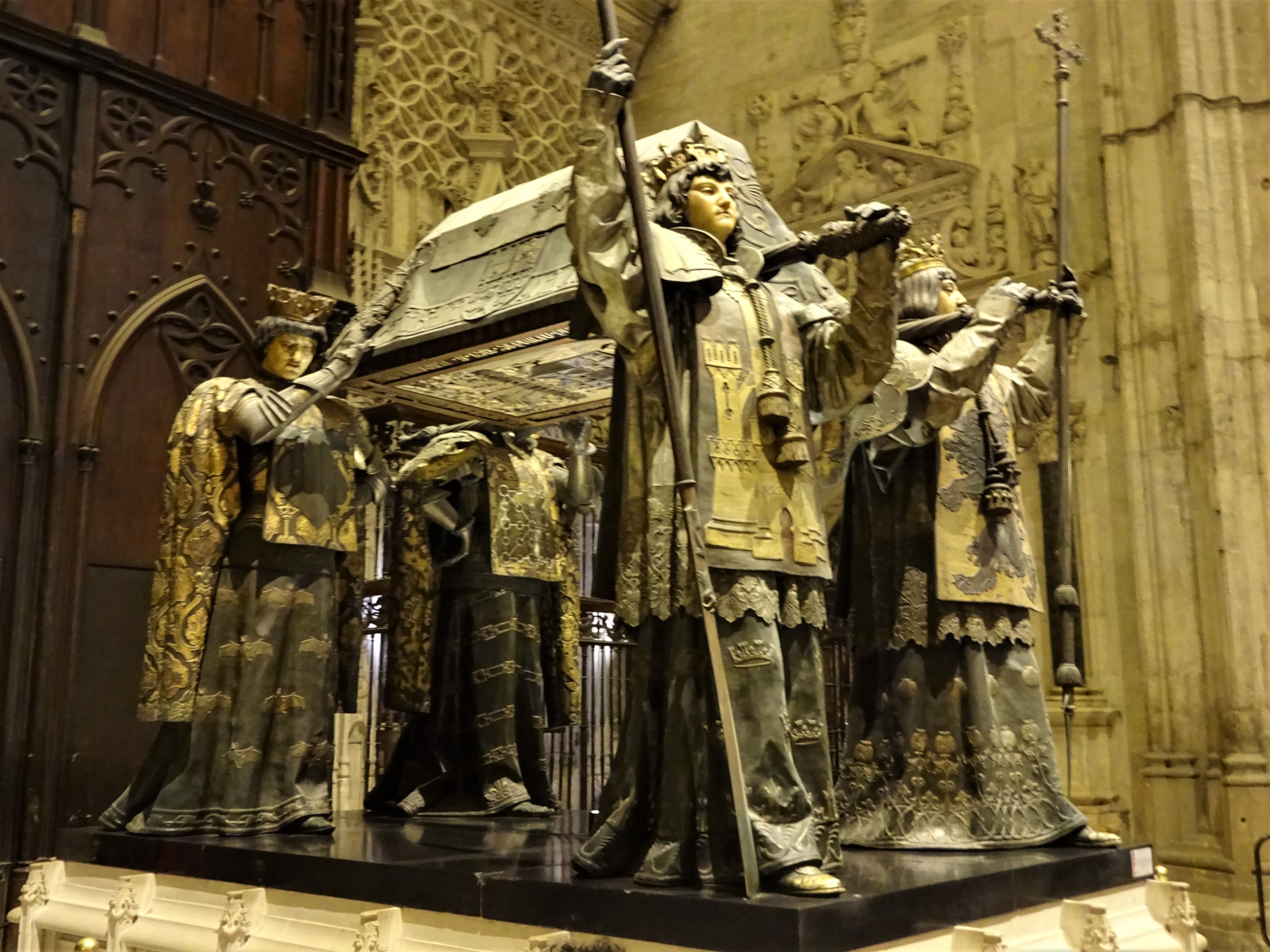 Grabmal des Kolumbus, Kathedrale von Sevilla